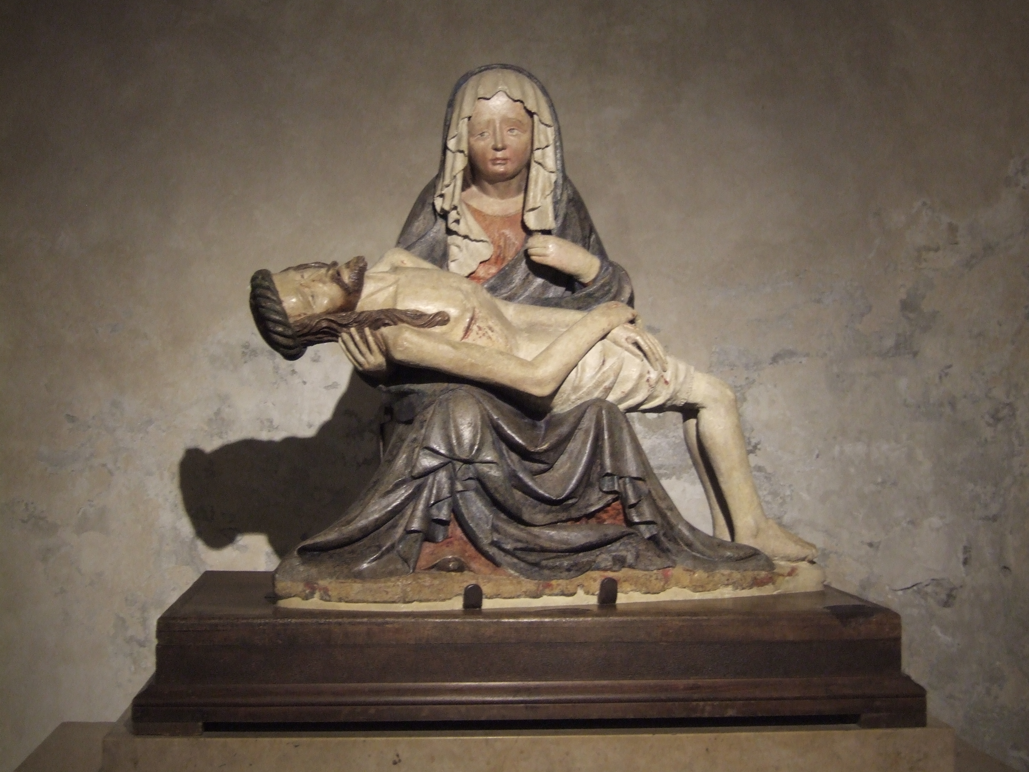 Abbazia di Sesto al Reghena - Vesperbild